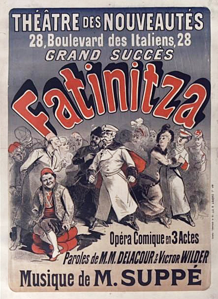 Théâtre des Nouveautés... Fatinitza ... Musique de M. Suppé : affiche